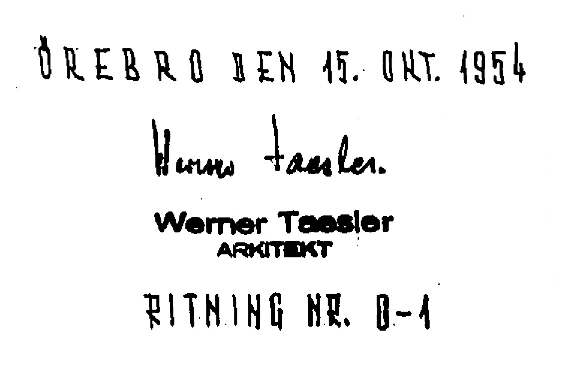 Arkitekt Werner Taeslers anmnteckning